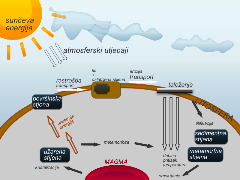 Ciklus stijene i procesi nastanka tla